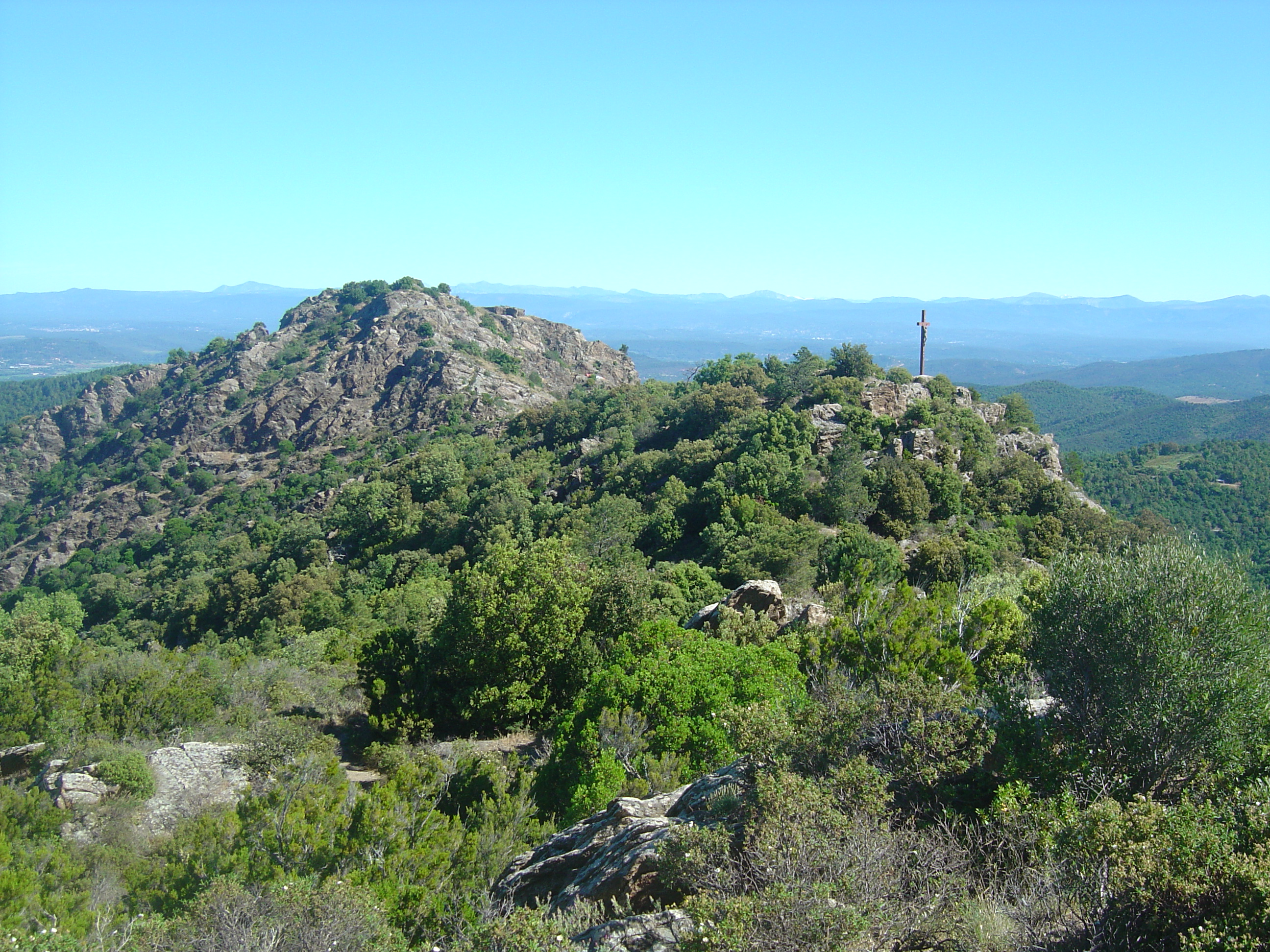 Croix et fort au-dessus de la Garde-Freinet